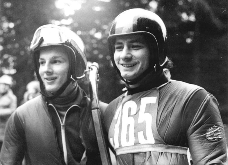 Bernd Hahn, Ulrich Hahn ADN-ZB Schaar str-16.2.1975-Hammerstrand: Rennschlitten-Weltmeisterschaften-Bei den DDR-Meisterschaften, wo dieses Foto entstand, wurden Bernd Hahn (l.) und Ulrich Hahn nur Dritter, am 16.2. standen sie in Hammerstrand als neue Doppelweltmeister fest, nachdem sie im letzten Lauf Bahnrekord gefahren waren.